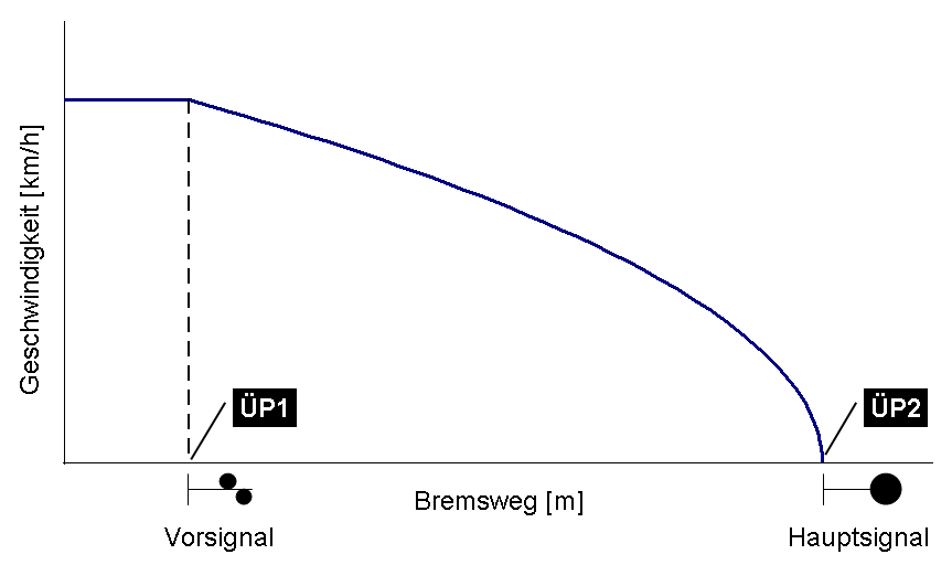 Eine punktförmige Zugbeeinflussung überträgt die Informationen nur an gewissen Stellen auf das Triebfahrzeug. Zwischen den Übertragungspunkten (ÜP1 und ÜP2) erfolgt keine Informationsübertragung.